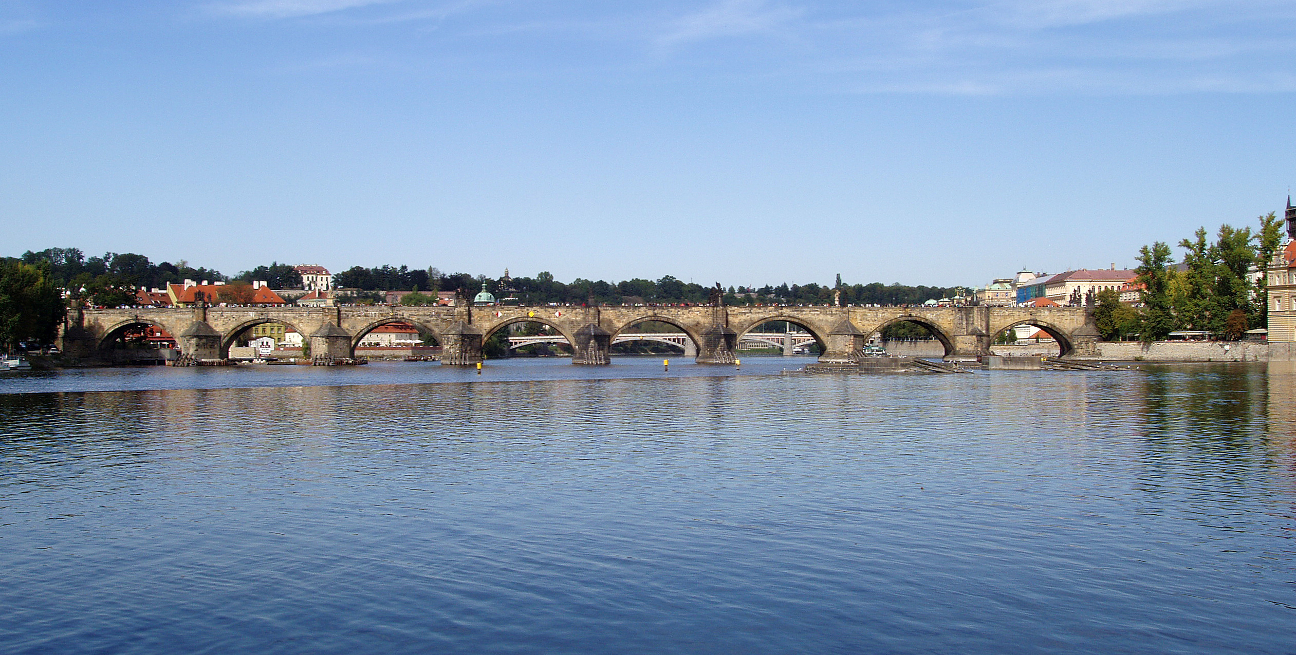 karlův most (Charles bridge)